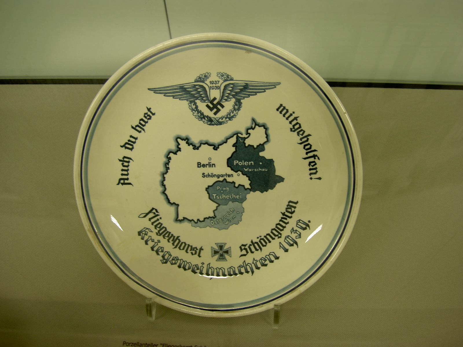 Weihnachtsteller des Schöngarten Fliegerhorst im Luftwaffenmuseum Berlin-Gatow: Auch du hast mitgeholfen! Fliegerhorst Schöngarten Kriegsweinachten 1939